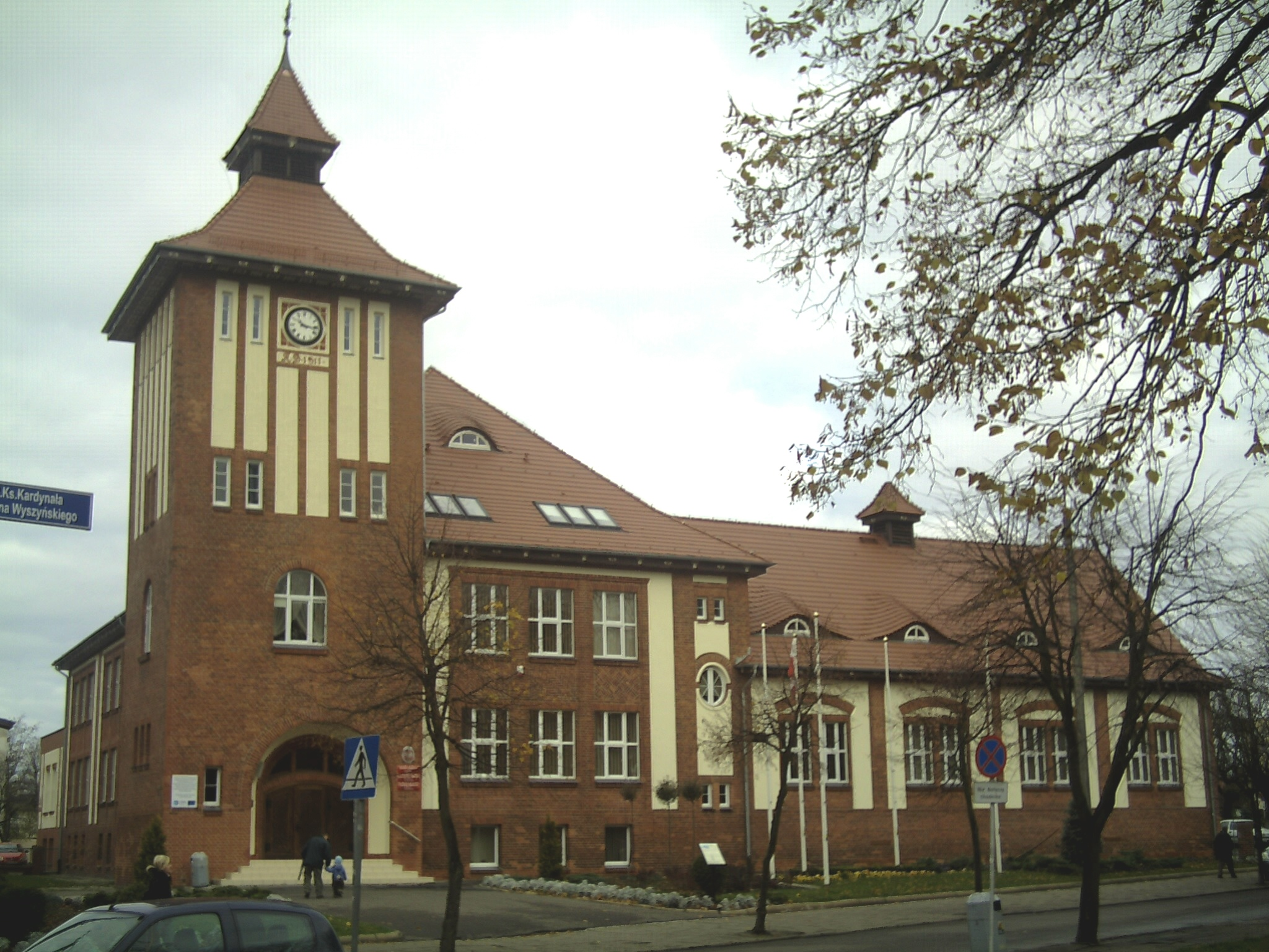 Ustka, ul. Kardynała Wyszyńskiego 3 - pierwotnie szkoła, obecnie ratusz 1911